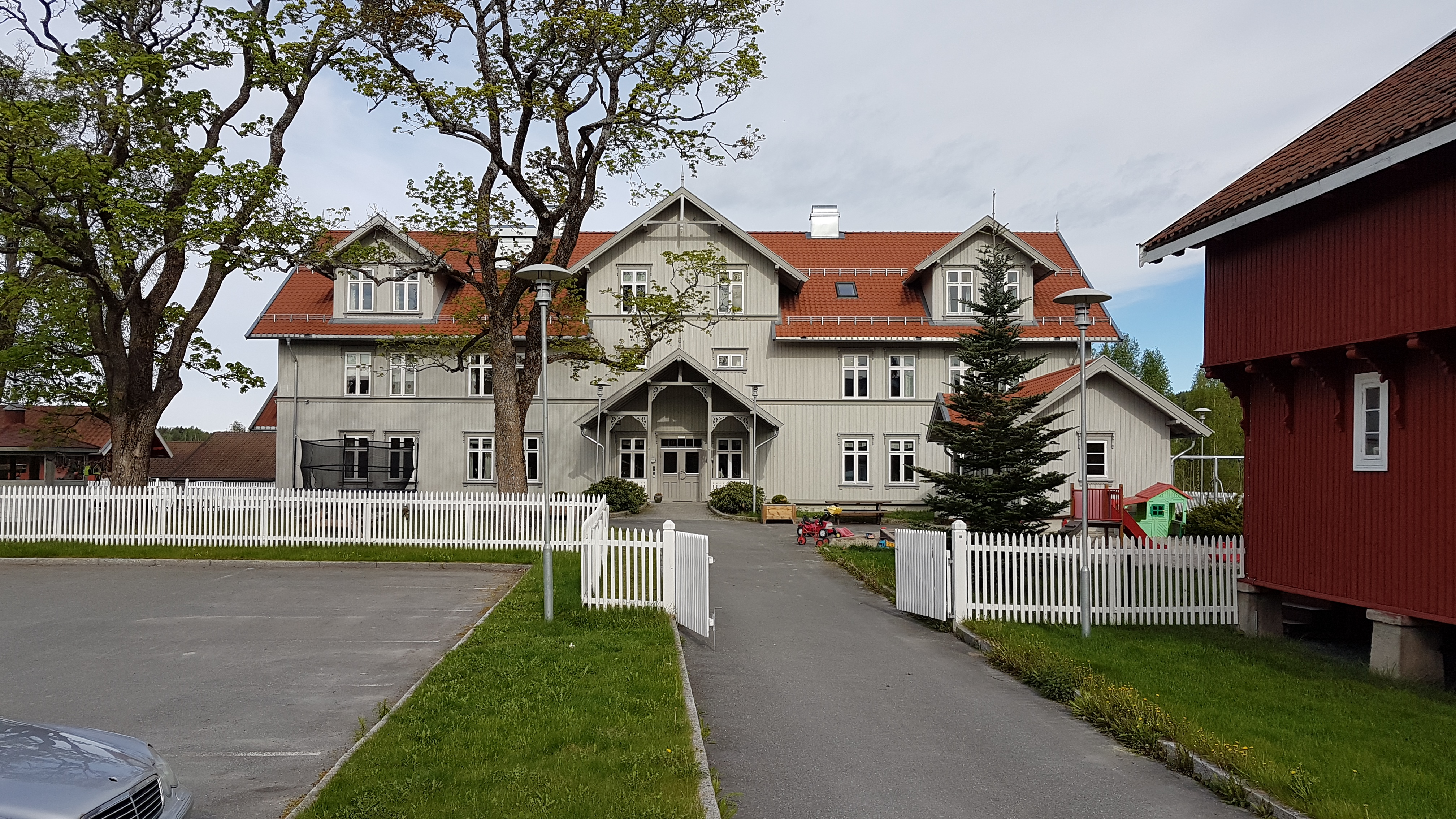 Våningshuset på Hov gård i Hønefoss, Ringerike kommune